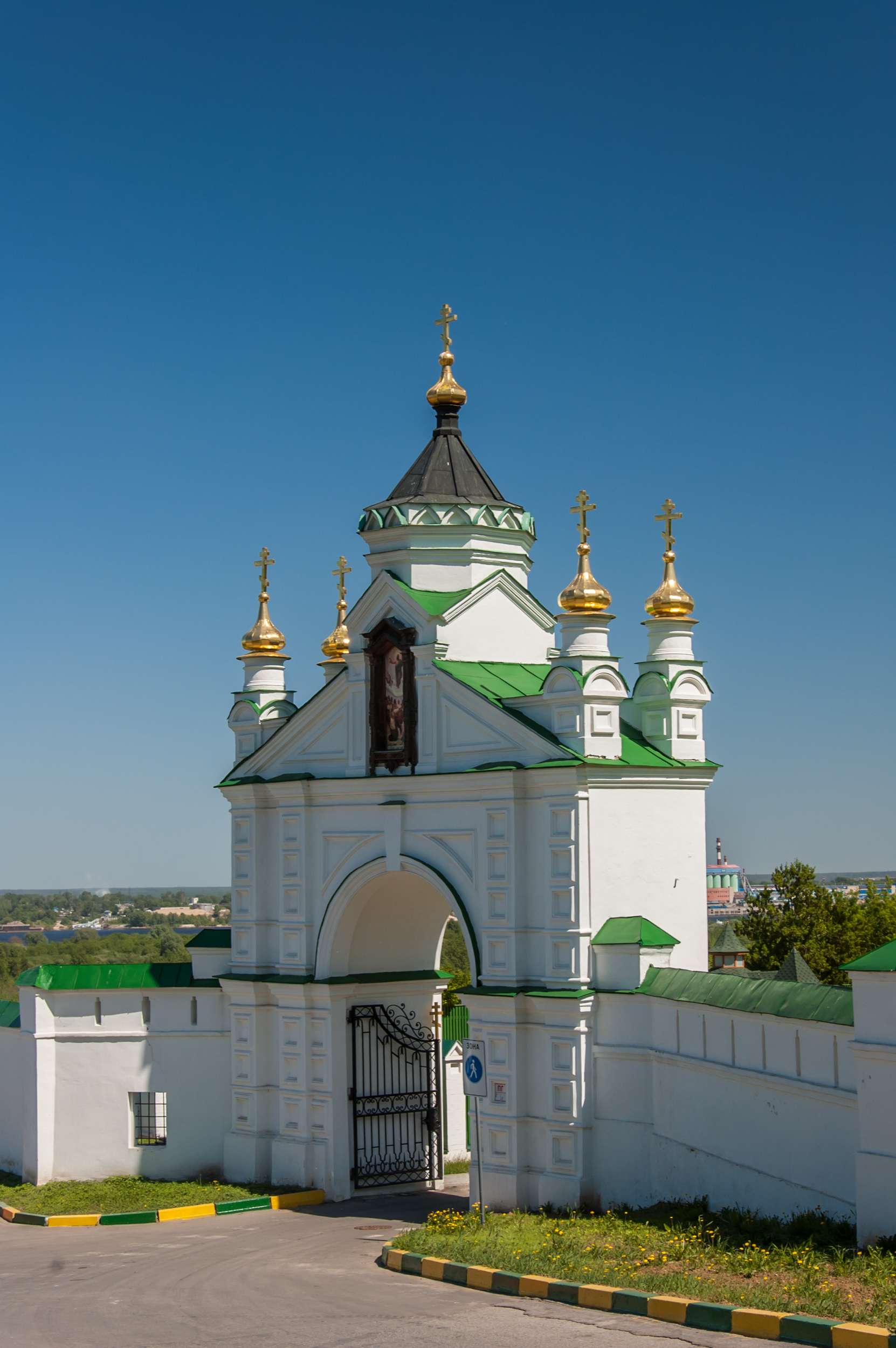 Ворота западные: Приволжская слобода, 108, Нижний Новгород, Нижегородская область